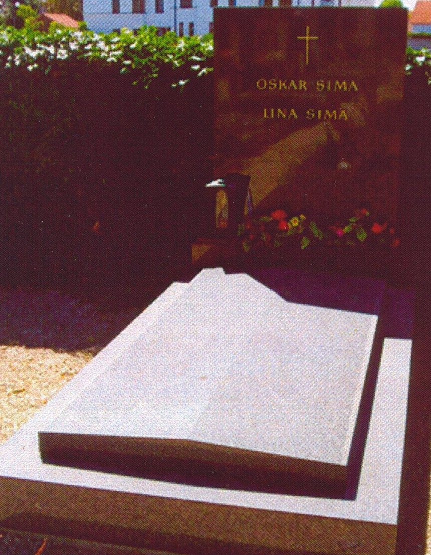 Friedhof Langenzersdorf-Oskar Sima